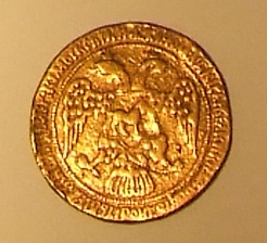 «СВАДЕБНЫЙ» ЗОЛОТОЙ В ДЕСЯТЬ УГОРСКИХ (ПОРТУГАЛ) 1606 год Москва. Царь Димитрий Иванович – Лжедимитрий I Золото; чеканка Диаметр – 3,3 Поступил в 1917 году из собрания И.И. Толстого ГЭ инв. ОН-Р-Аз 32